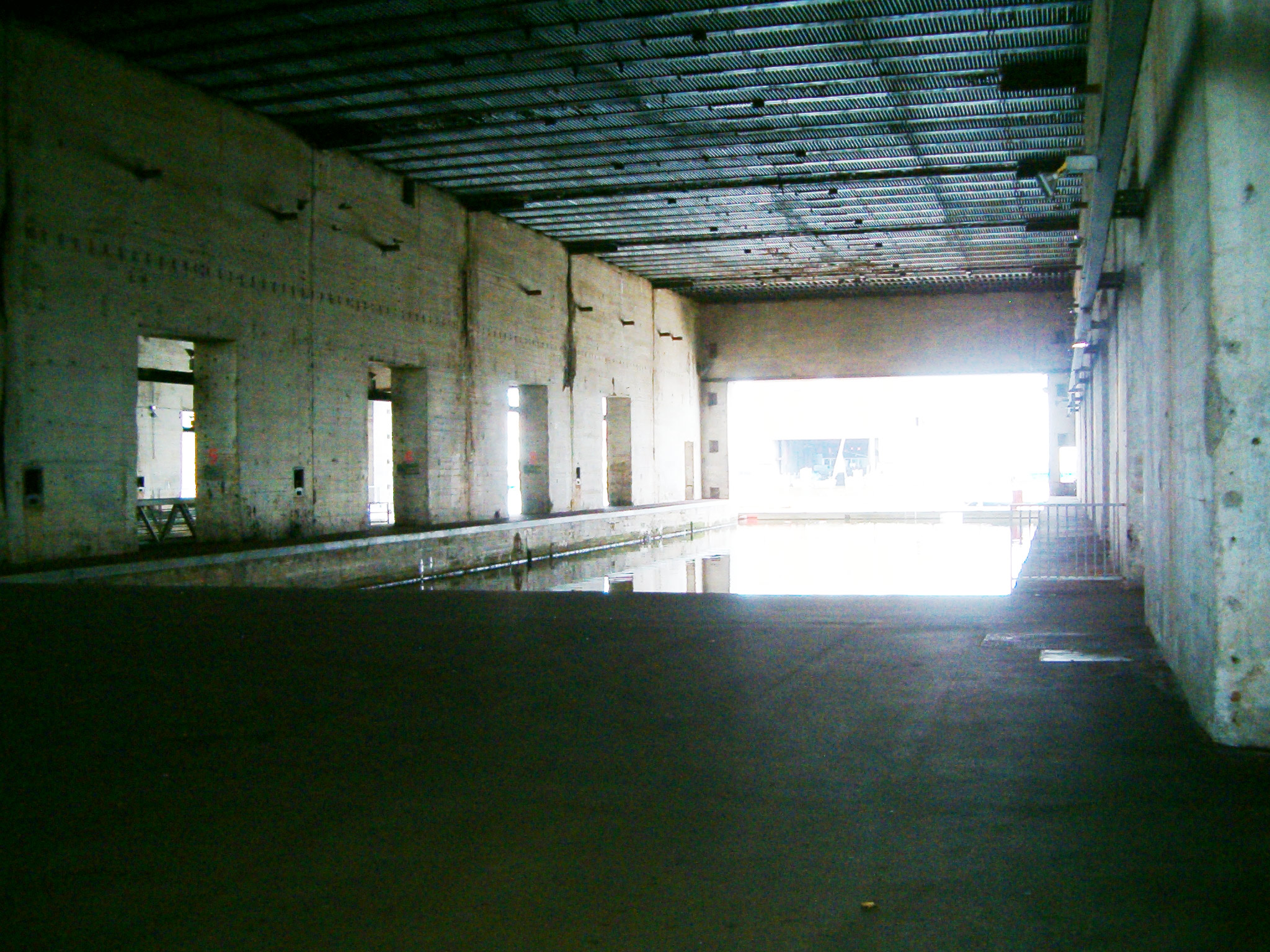 U-bootbunker Saint-Nazaire